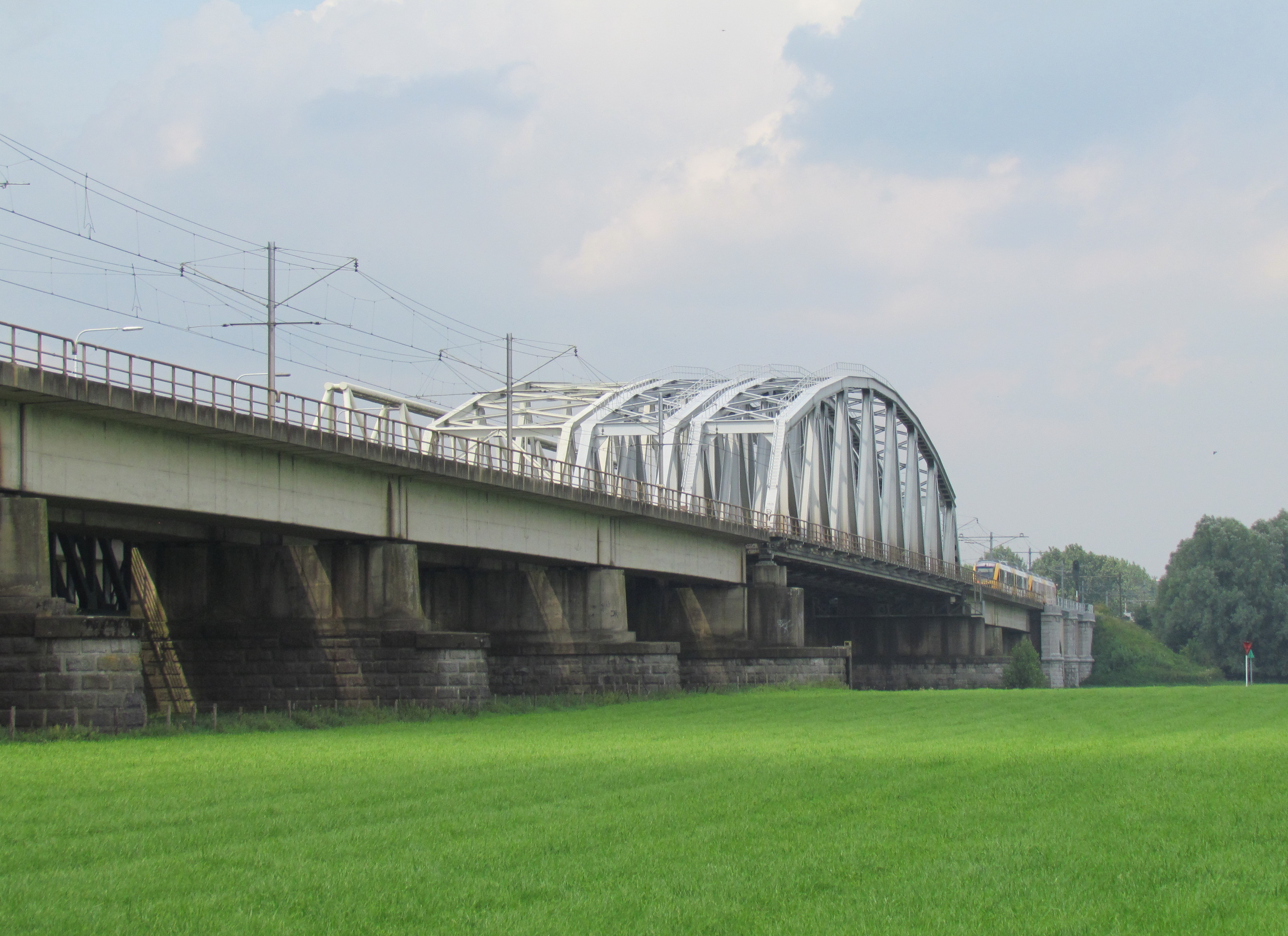 Trein-, fiets- en autobrug over de IJssel tussen Westervoort en Arnhem